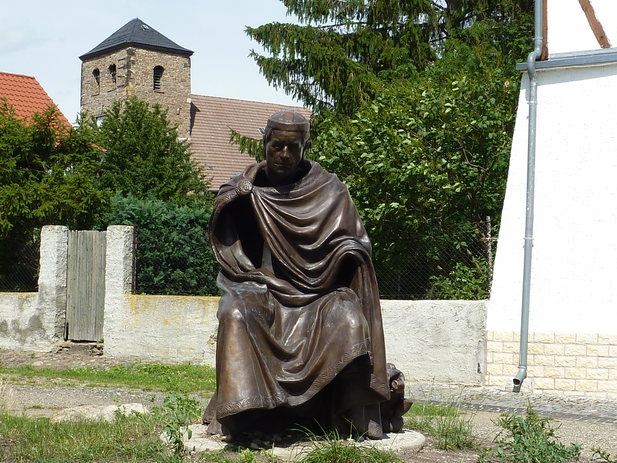 Graf Hessi-Denkmal beim Kloster Wendhusen in Thale.